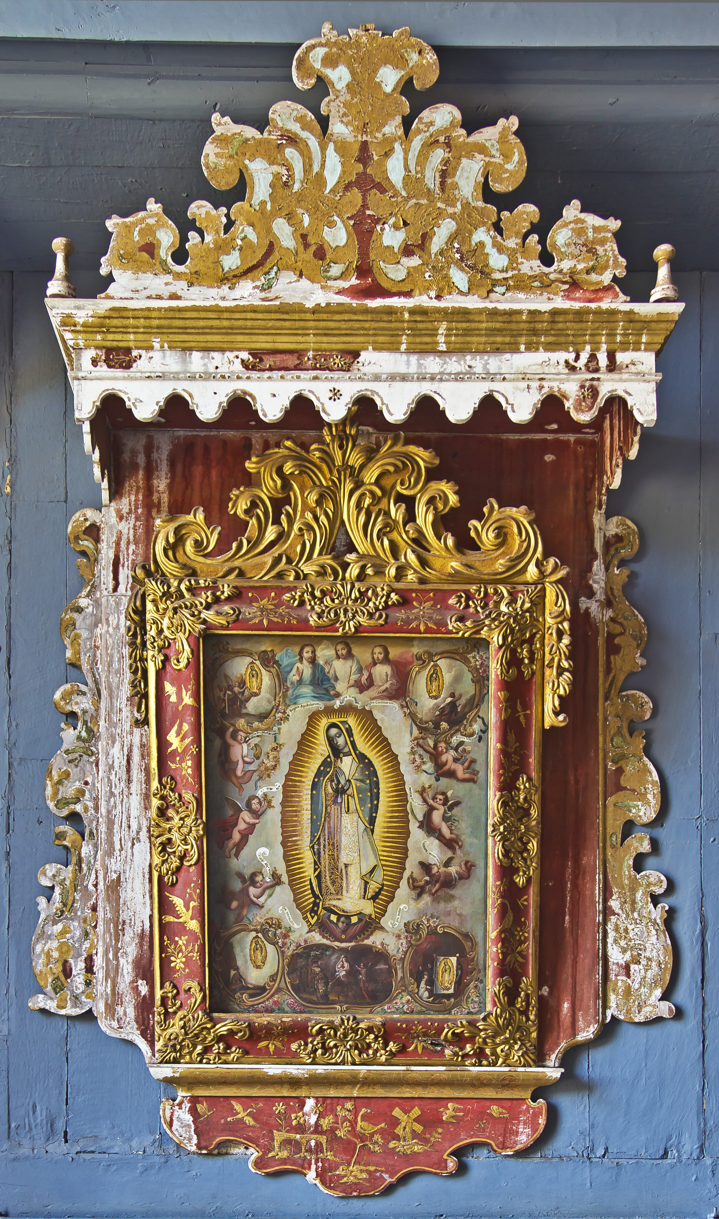 Altar Unserer Lieben Frau von Guadelupe (Retablito de Nuestra Señora de Guadelupe) der Kirche Santa Catalina in Tacoronte